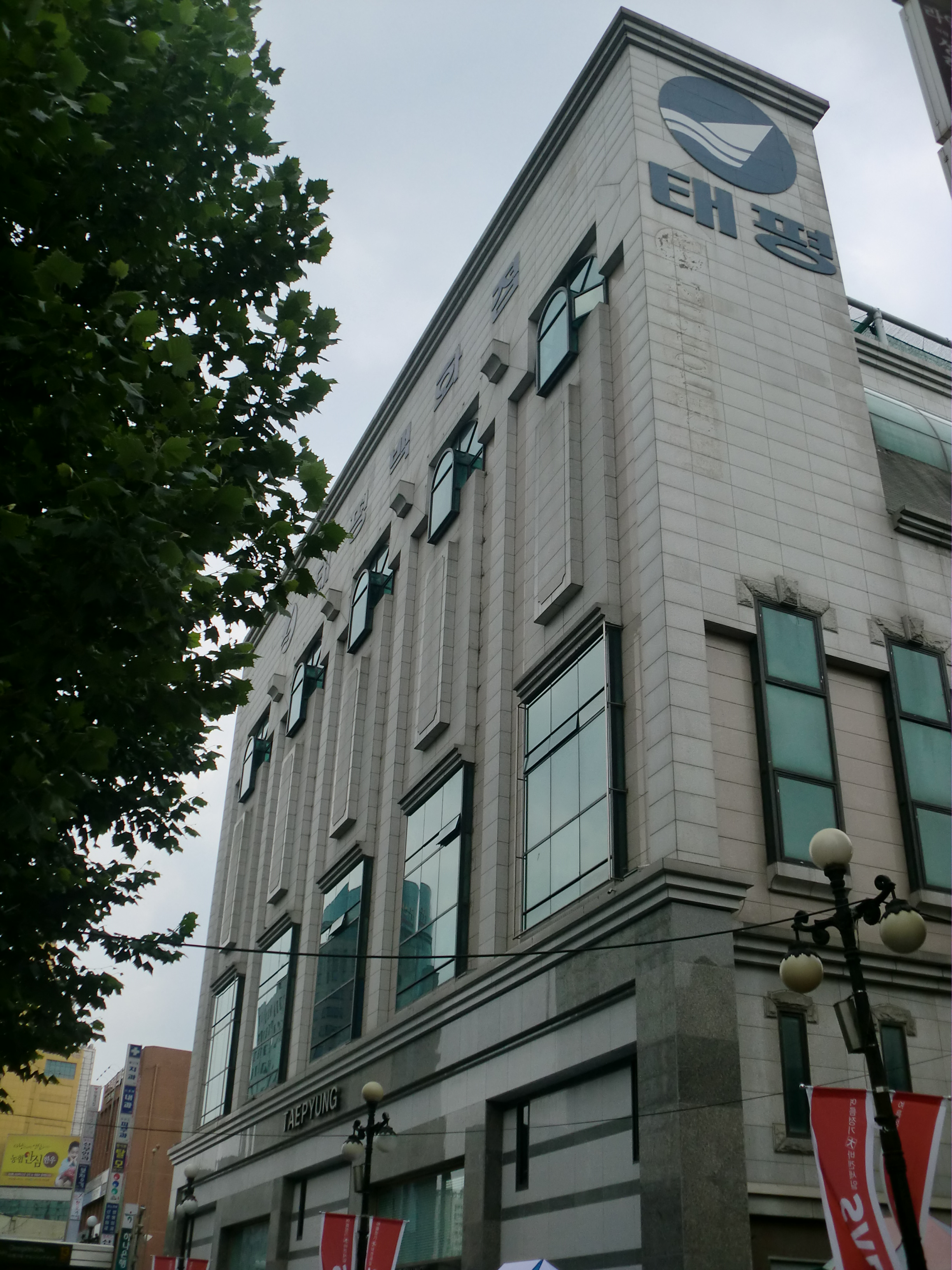 서울특별시 동작구에 있는 태평백화점